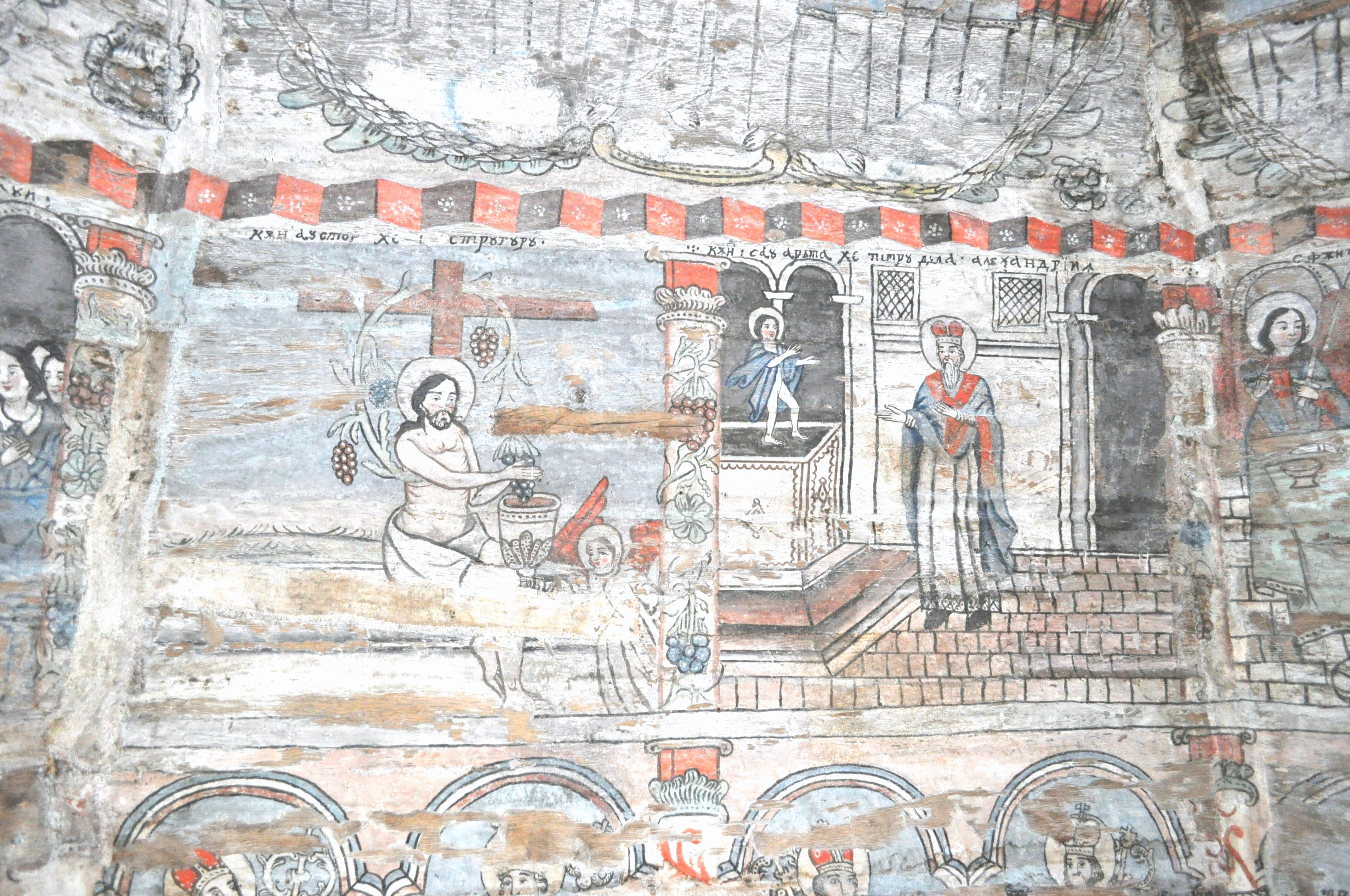 Biserica de lemn "Intrarea Maicii Domnului în Biserică" , sat BÂRSANA